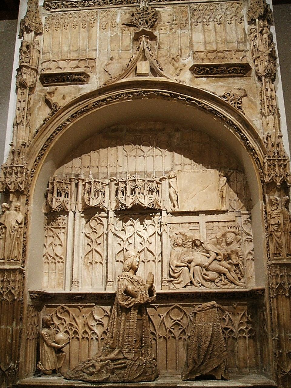 Sepulcro de Don Juan de Padilla, procedente del Real Monasterio de Santa María de Fresdelval, hoy en el Museo de Burgos